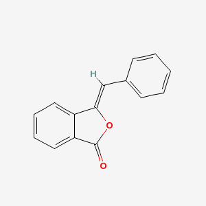 Benzalphthalide 3-Benzylidenephthalide